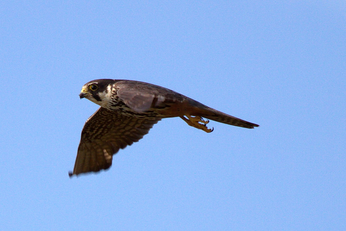 Vorbeifliegender Baumfalke im Naturschutzgebiet Bislicher Insel in NRW, Deutschland